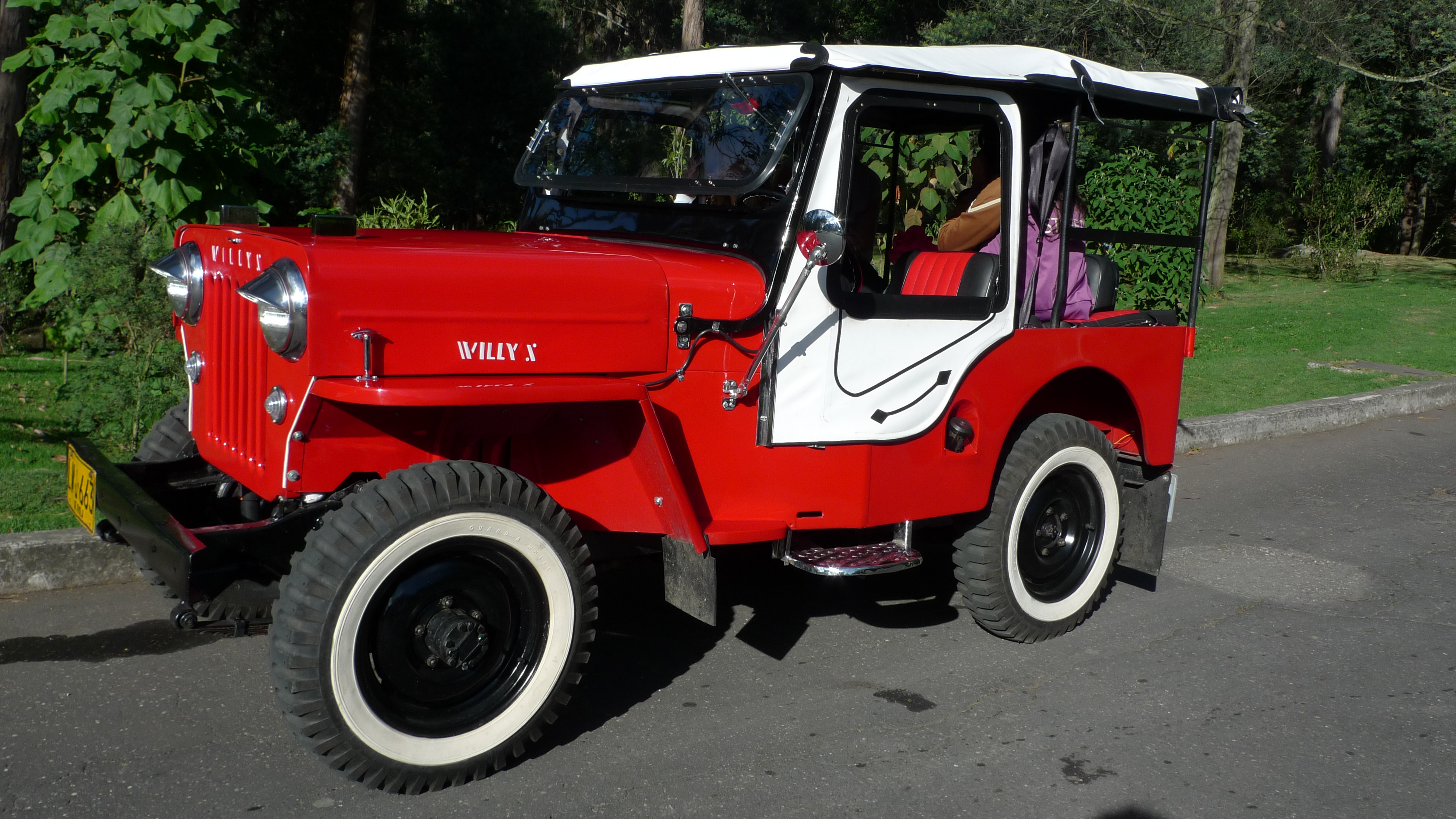 Jeep Willys CJ-3B, modelo 1954, restaurado en Sevilla, Valle del Cauca, Colombia.